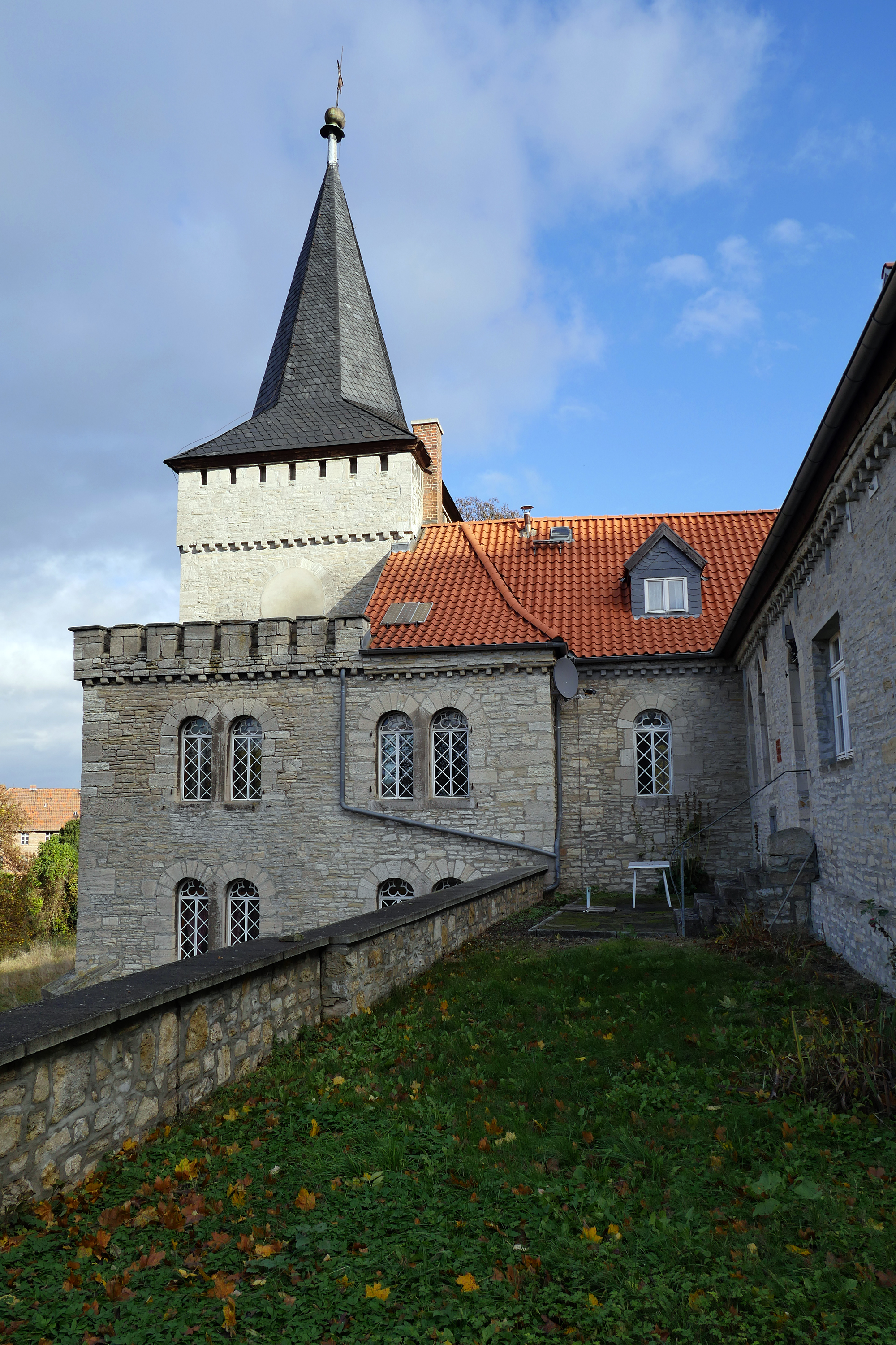 Teil des Schlosses Röderhof im Huy, am Fuße der Huysburg